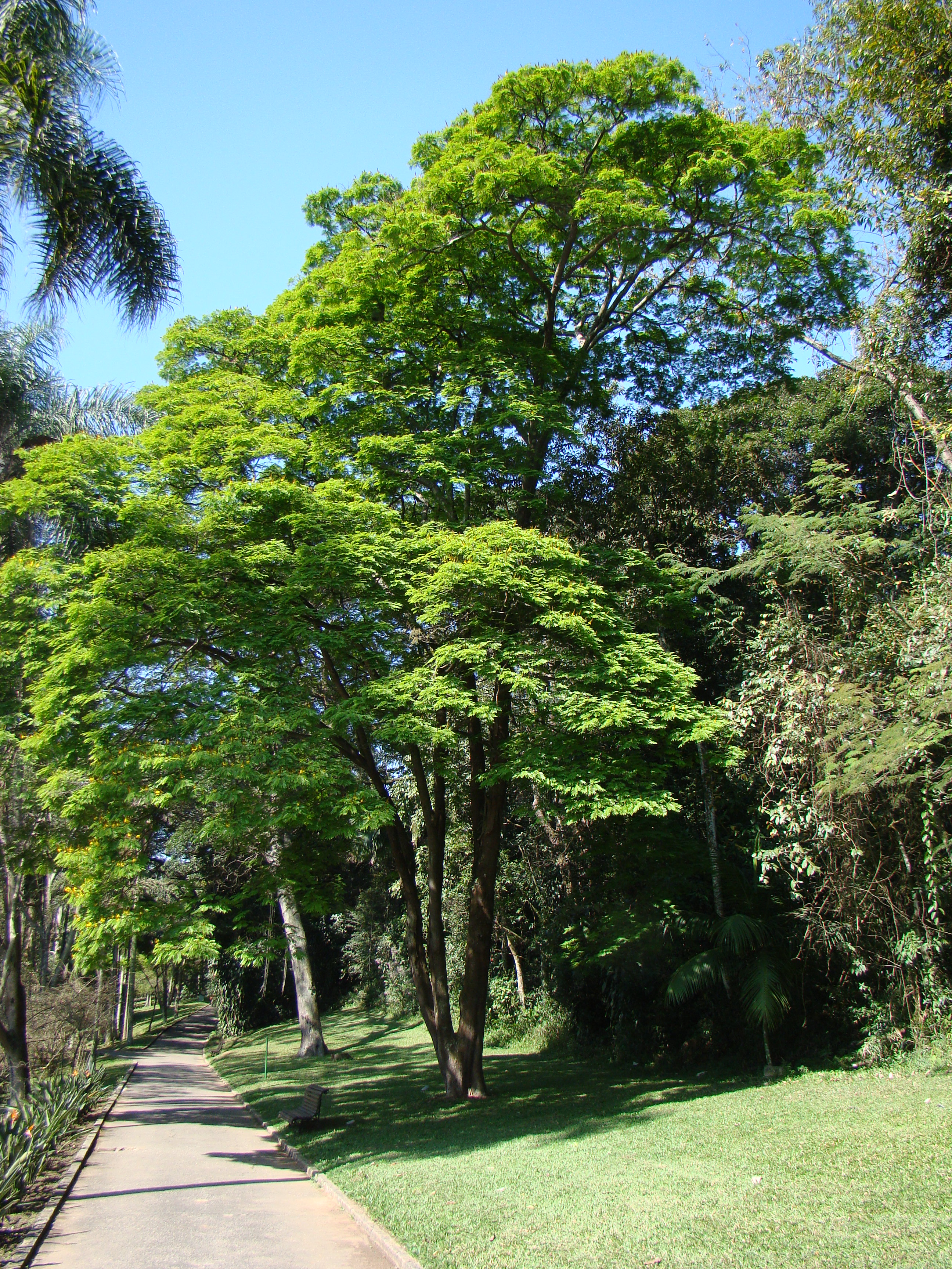 Caesalpinea pluviosa jd botanico sao paulo